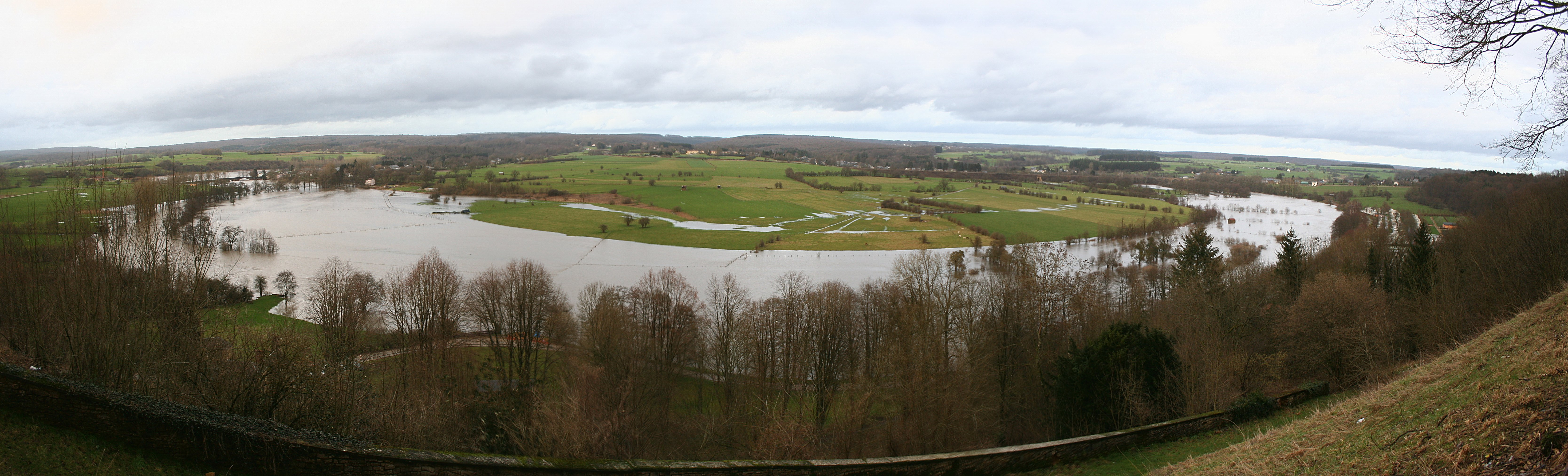 Le méandre gaumais de la Semois au pied de la cuesta de Florenville lors de l'inondation du 19 janvier 2007.